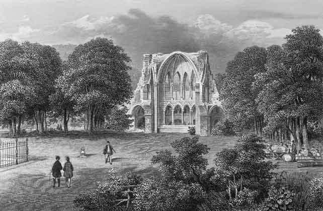 Ruin of Kloster Heisterbach